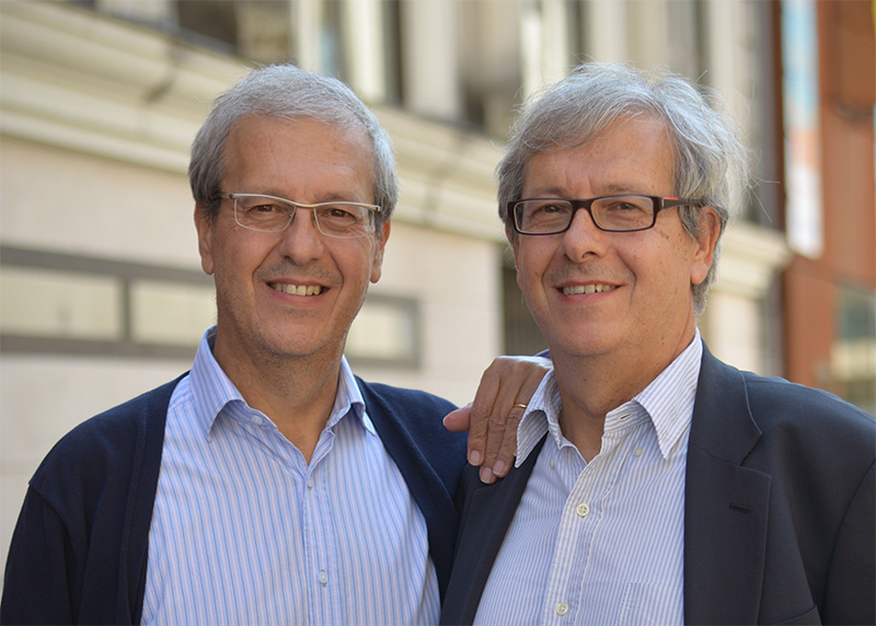 Paul et Gaëtan Brizzi au Mans le 19 septembre 2015.